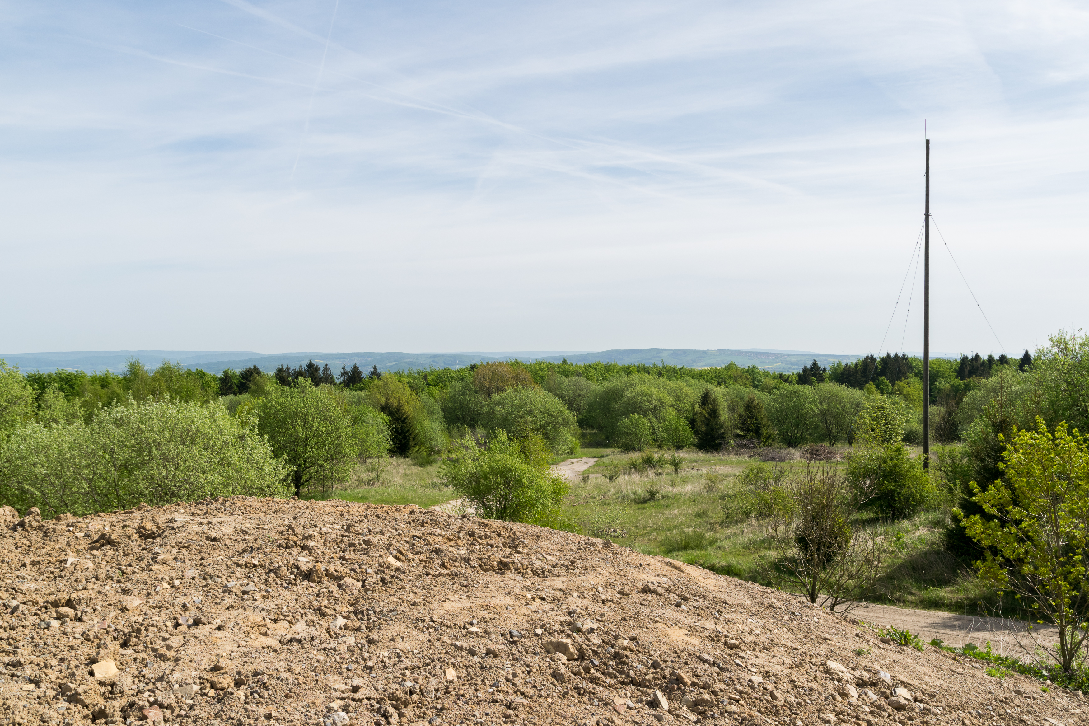 Blick vom Schuttberg auf dem Steinberg im Naturschutzgebiet Alt-Sternberg und Steinberg